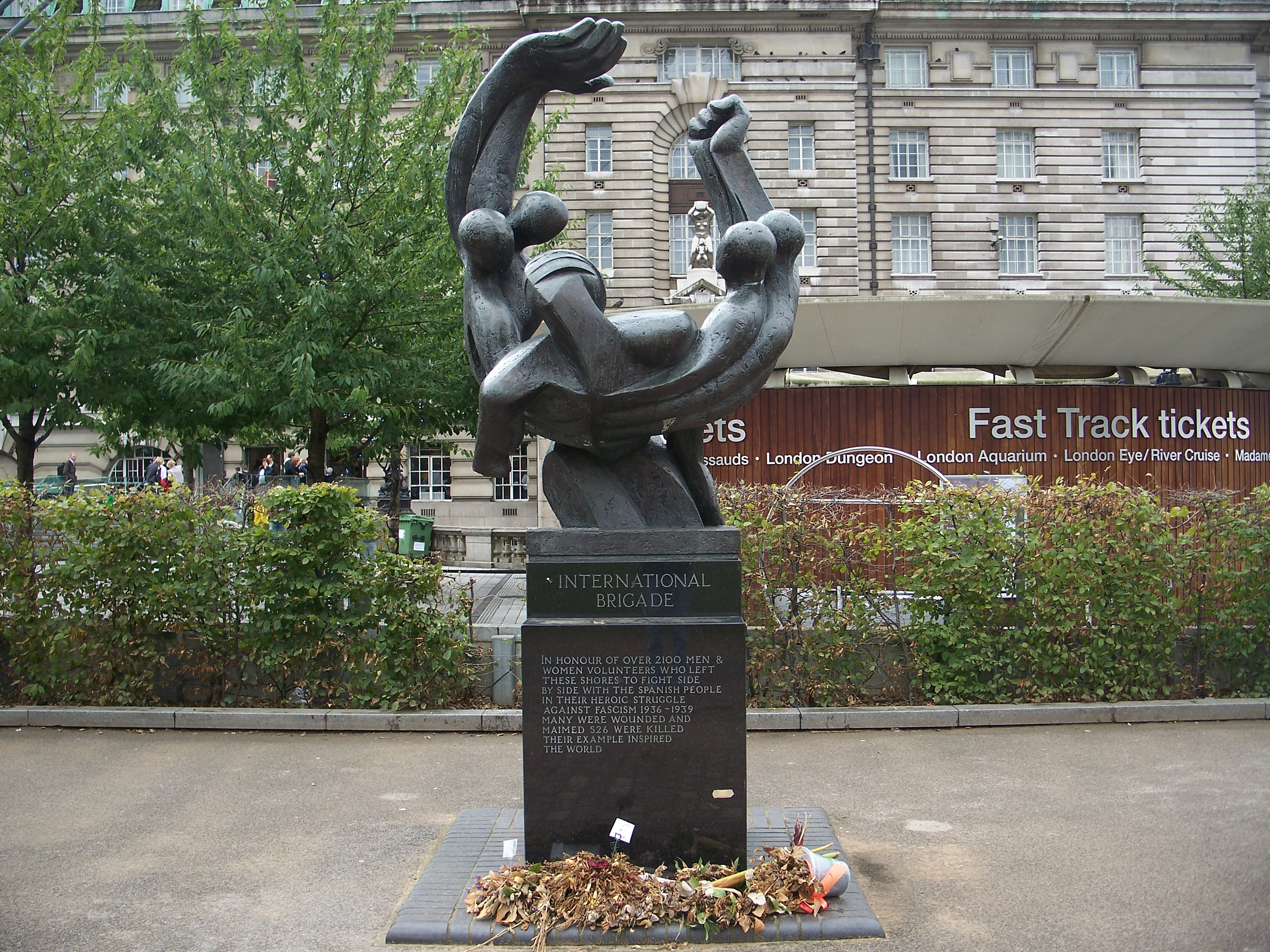 Monument a les brigades internacionals en Londres